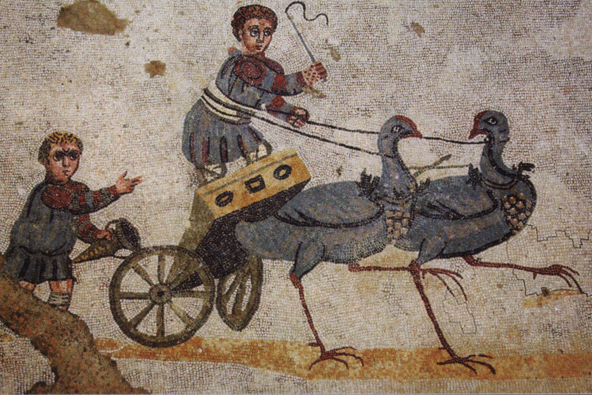 Villa del Casale - Enfants auriges sur un char mené par des échassiers.